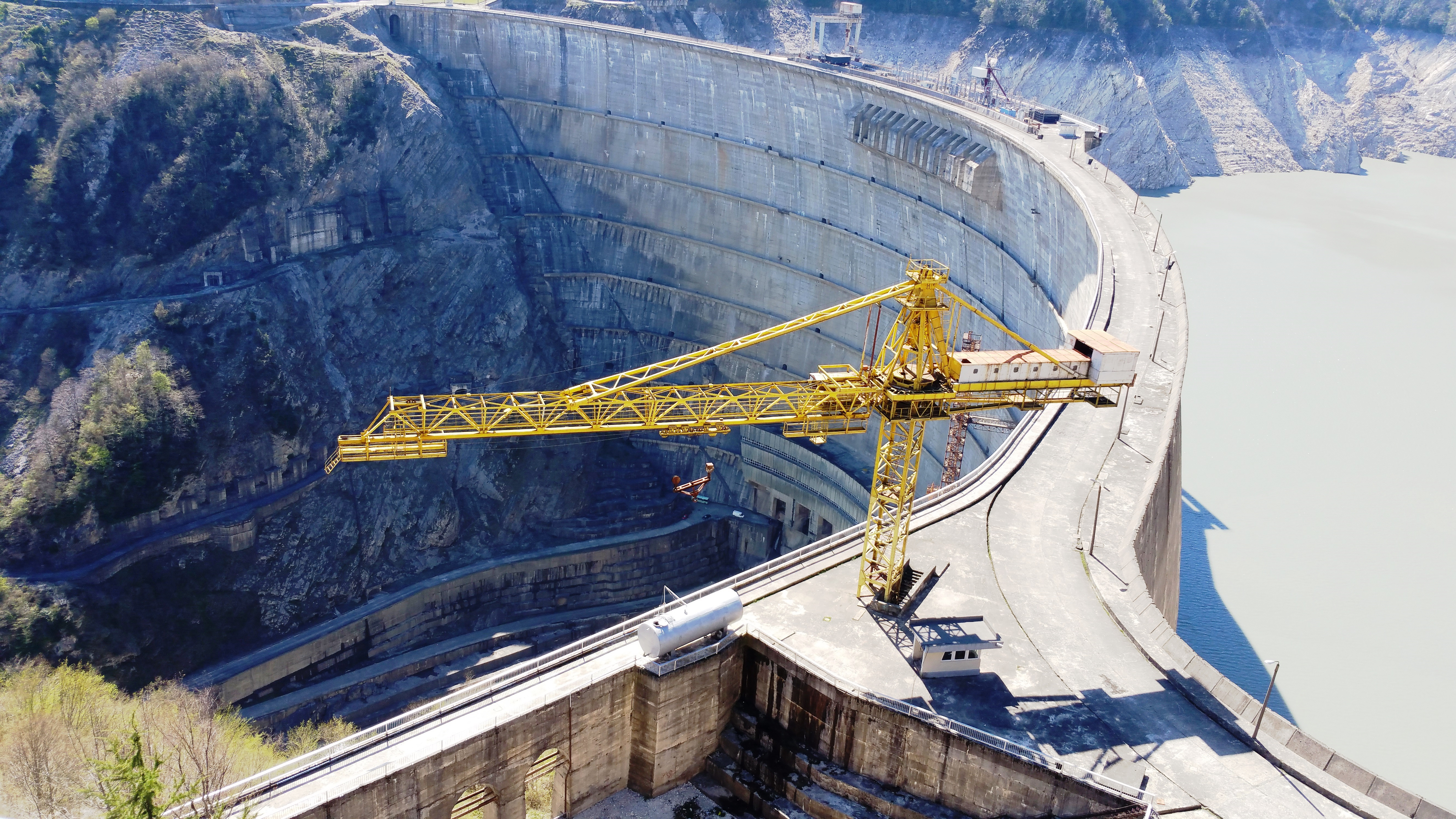 ენგურჰესის კაშხალი